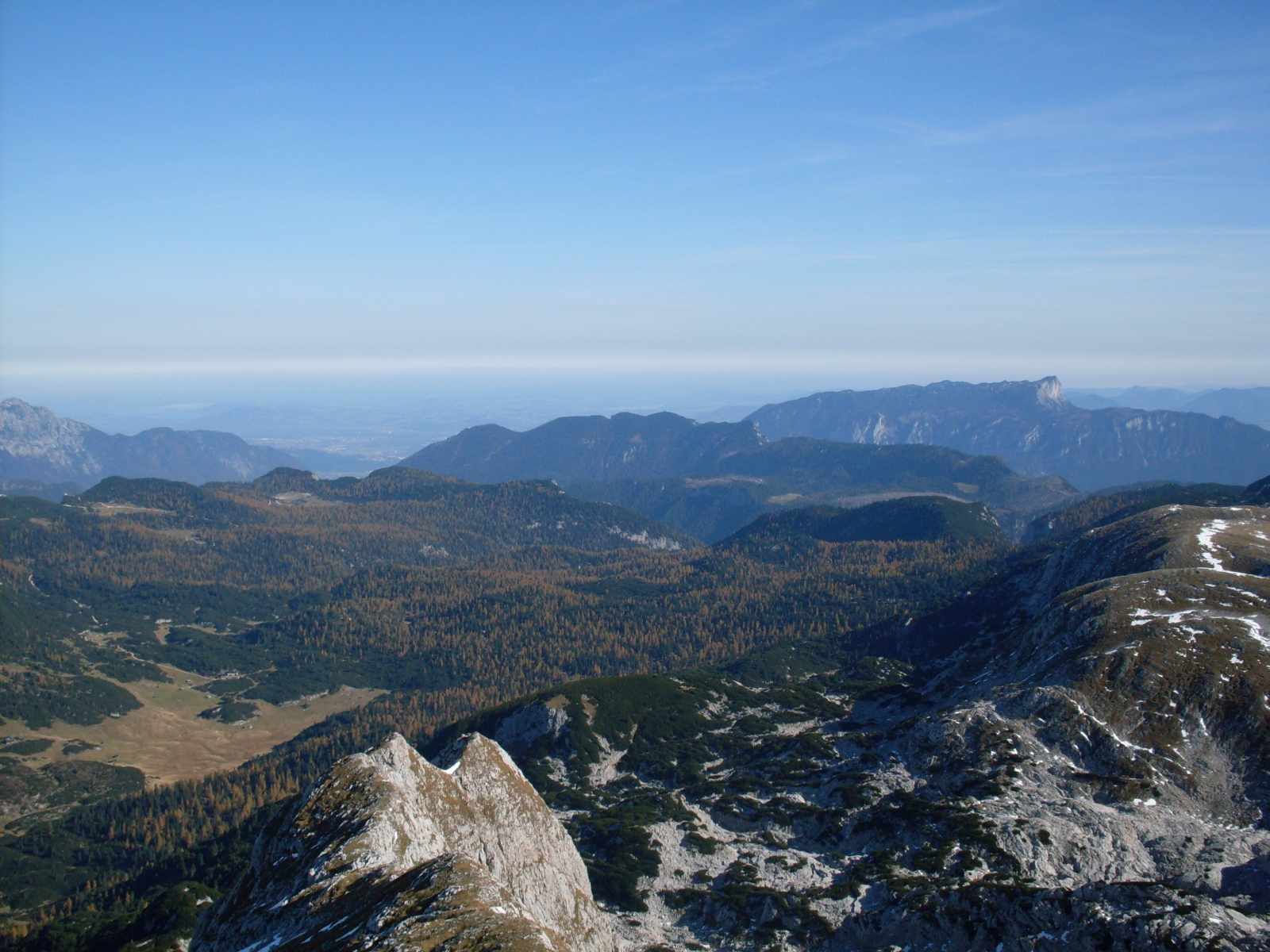 Blick vom Großen Häuselhorn nach Norden auf die Hochfläche der Reiter Alm. Rechts im Hintergrund der Untersberg mit dem Berchtesgadener Hochthron